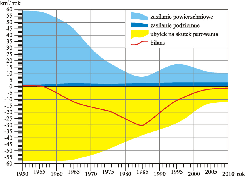 Wykres przedstawia udział dostaw wody z Syr-darii i Amu-Daii (zasilanie powierzchniowe), zasilania podziemnego i wielkość parowania z powierzchnii jeziora w ogólnym bilansie wodnym Jeziora Aralskiego. Opublikowano w: Zieliński M., 2014, Animowana mapa zmian zasięgu Jeziora Aralskiego - koncepcja, prototyp, ewaluacja, Praca magisterska, Uniwersytet Warszawski, Wydzial Geografii i Studiów Regionalnych, Zakład Kartografii Opracowano na podstawie danych: Matsuura K., 2000, Water Related Vision for the Aral Sea Basin for the year 2025. Imprimerie Des Presses Universitaires De France, Vendôme (Francja) Micklin P., 2007, The Aral Sea Disaster. [w:] The Annual Review of Earth and Planetary Sciences, Vol. 35, Annual Reviews